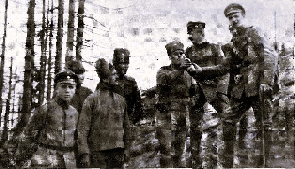 Treffen im Niemandsland